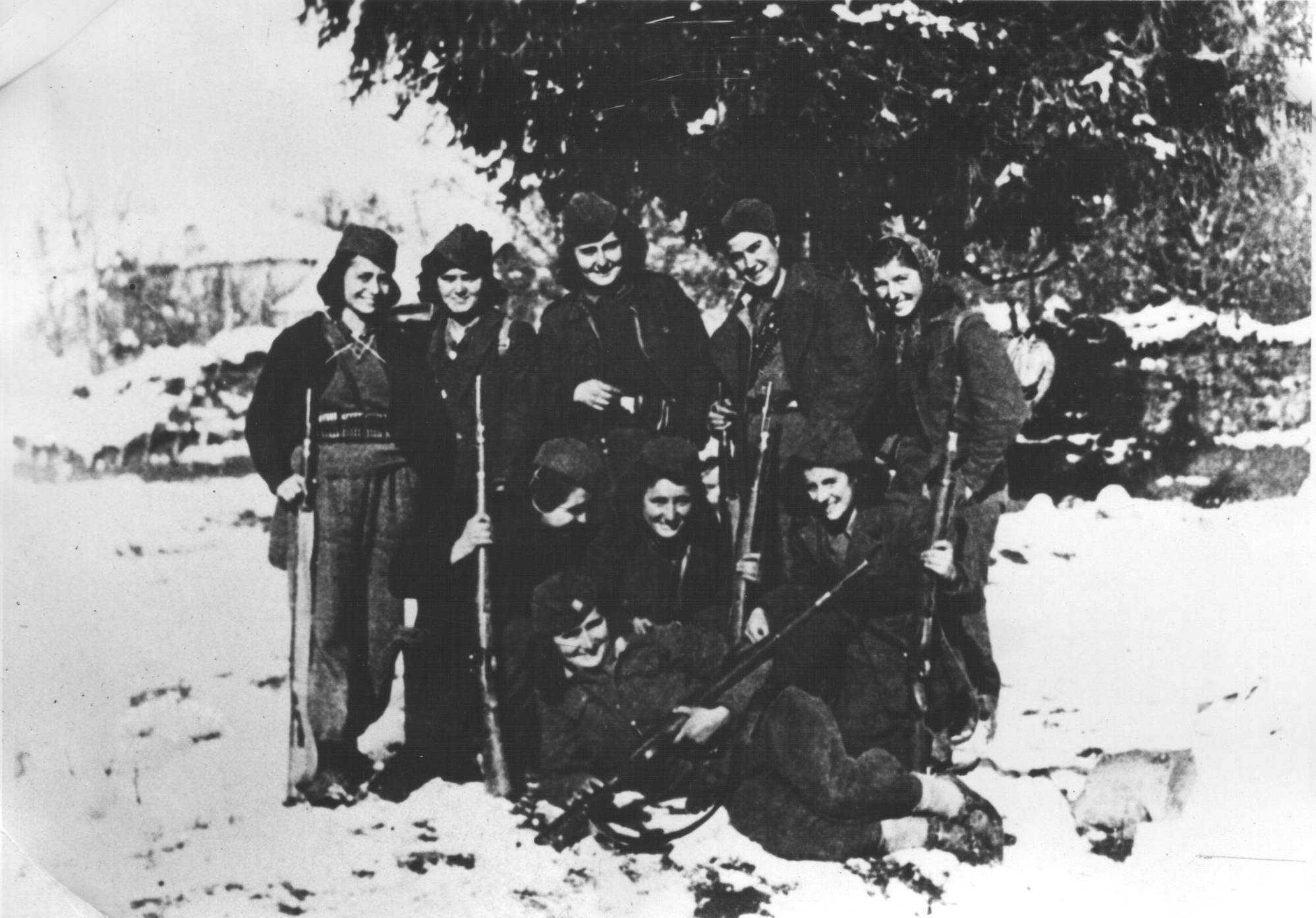 Srpskohrvatski / српскохрватски: Kosovske partizanke 1944.